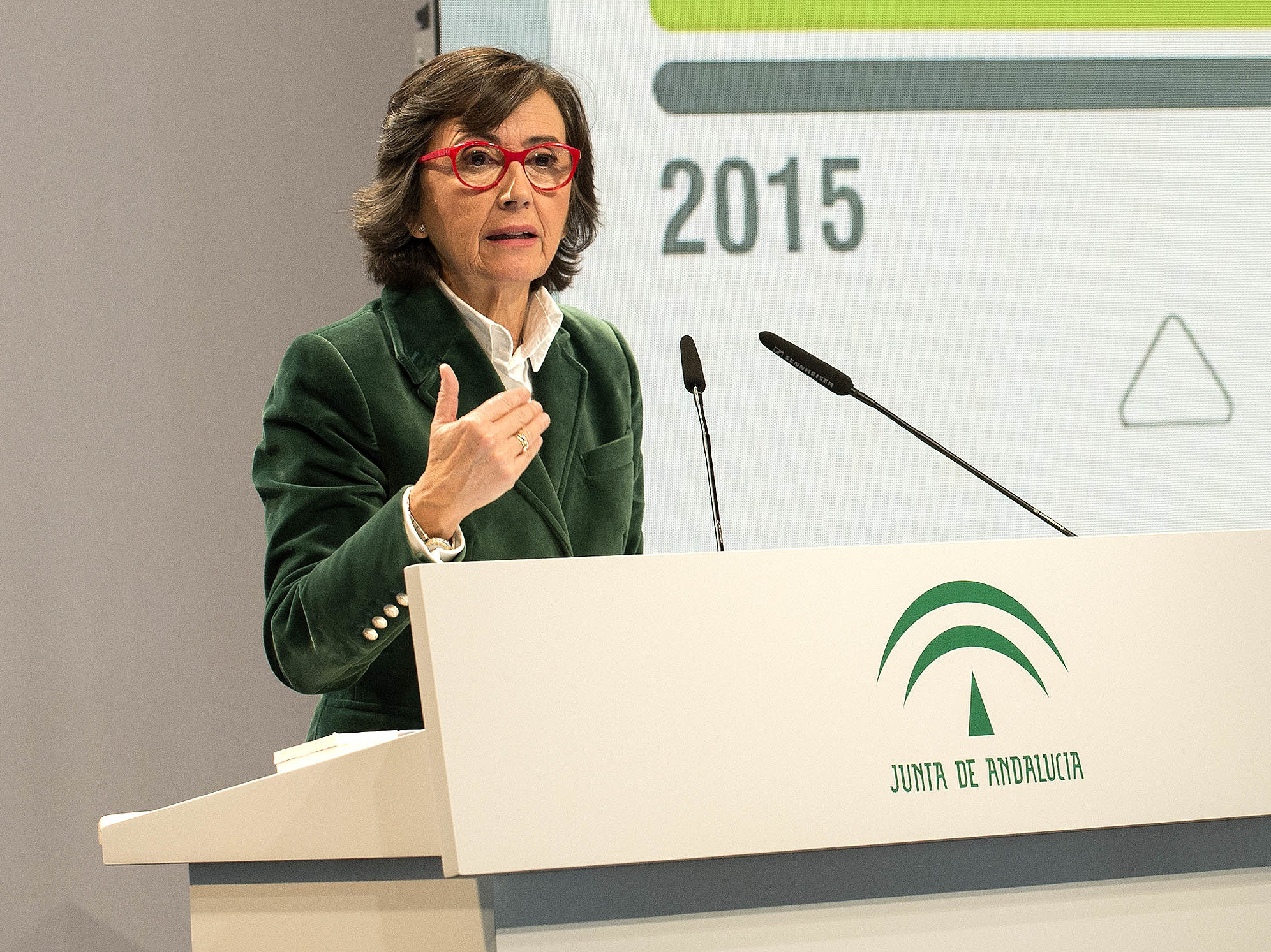 La Consejera de Interior y Justicia, Rosa Aguilar, dando cuenta de la participación en las elecciones al Parlamento de Andalucía de 2018.